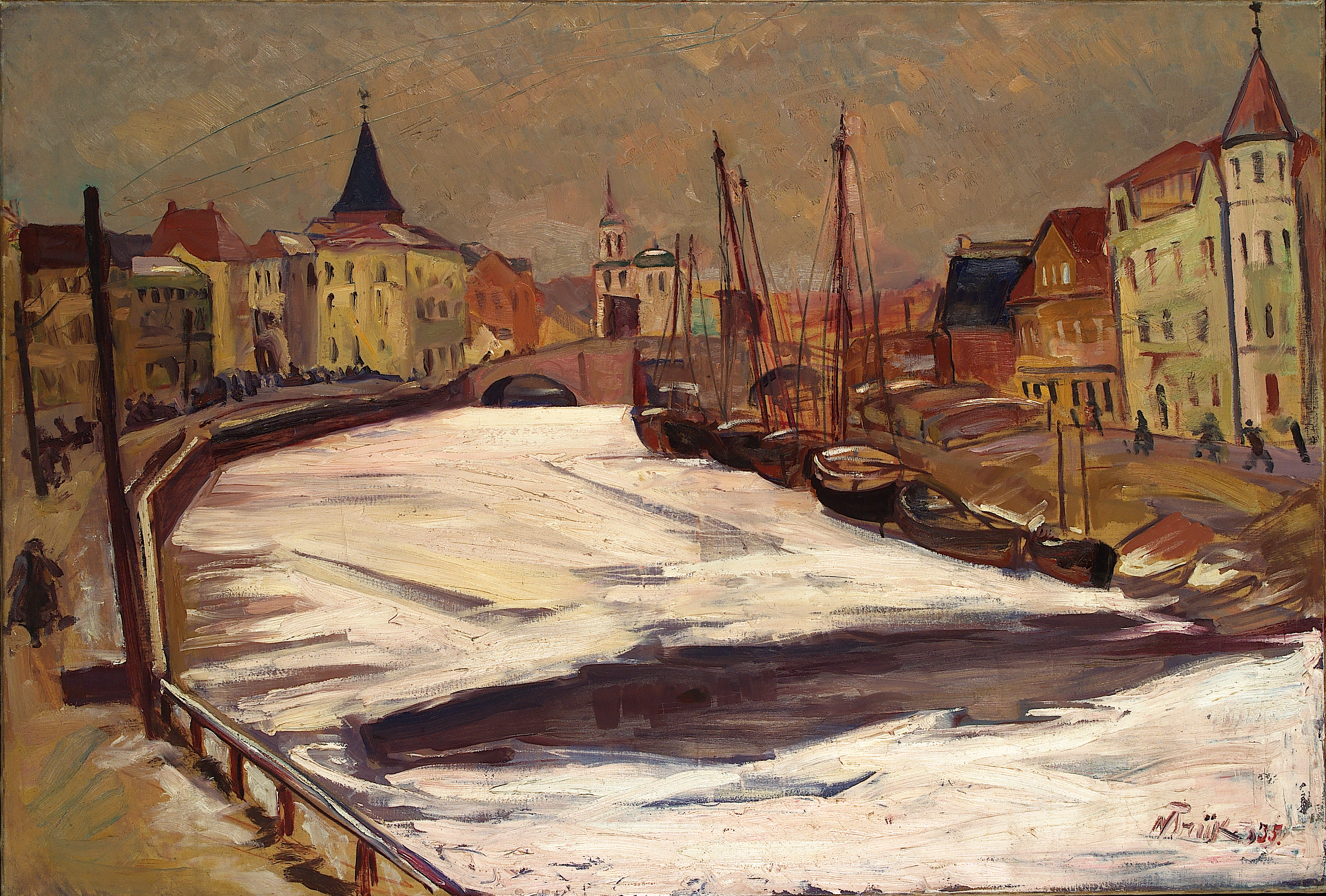 "Talvine Tartu Emajõega" (1935). Õli lõuendil. 93,8 x 138,5 cm. MUIS: TKM TR 4815 M 793 This image on crowdsourcing geotagging platform Ajapaik